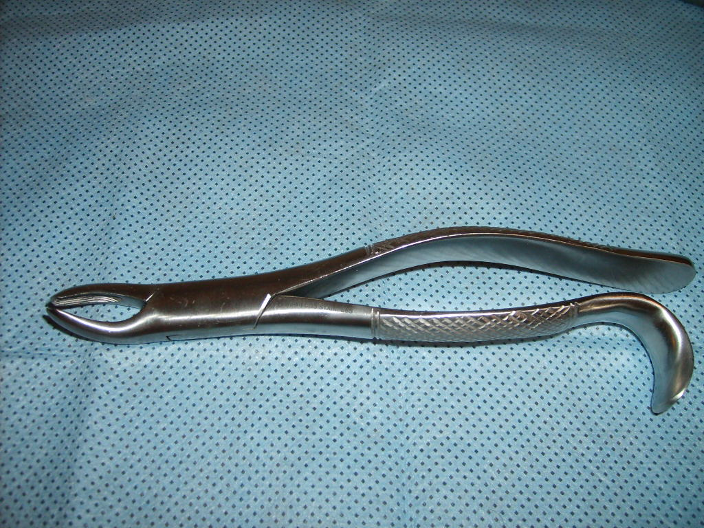 Fóceps n. 18R (right) - utilizado em odontologia